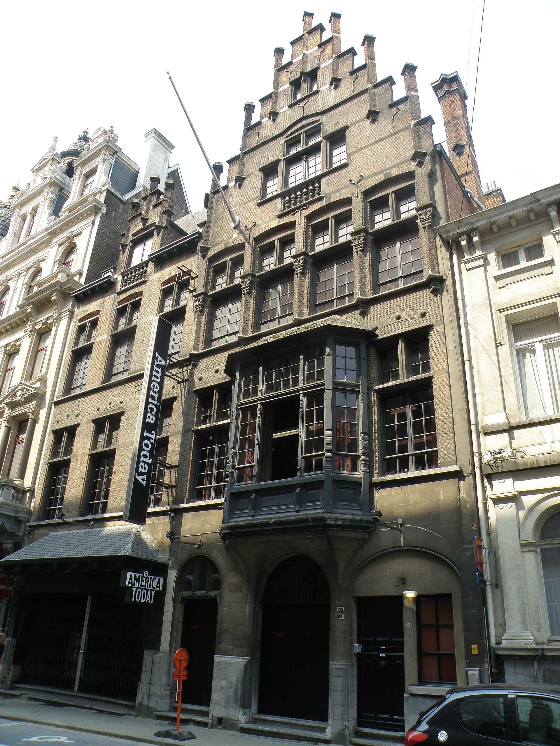 Anvers, Belgique. Ensemble de deux maisons sises Kipdorpvest n° 26 (maison de gauche) et 28 (maison de droite). Le n° 26 : anciennement demeure du directeur de feu le quotidien francophone anversois la Métropole, érigée en style néo-Renaissance flamande, selon les plans de l’archit. anversois Frans Van Dijk, 1902. Le rez-de-chaussée a été transformé en 1937. Le n° 28 (maison de droite) : maison de style semblable, érigée en 1937, à titre d’extension du n° 26, selon les plans de l’archit. bruxellois Marcel Chabot, 1937.